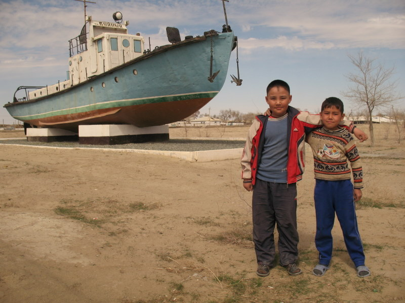 Kinderen poseren voor het 'monument' Aral Sea, Mo‘ynoq, Uzbekistan